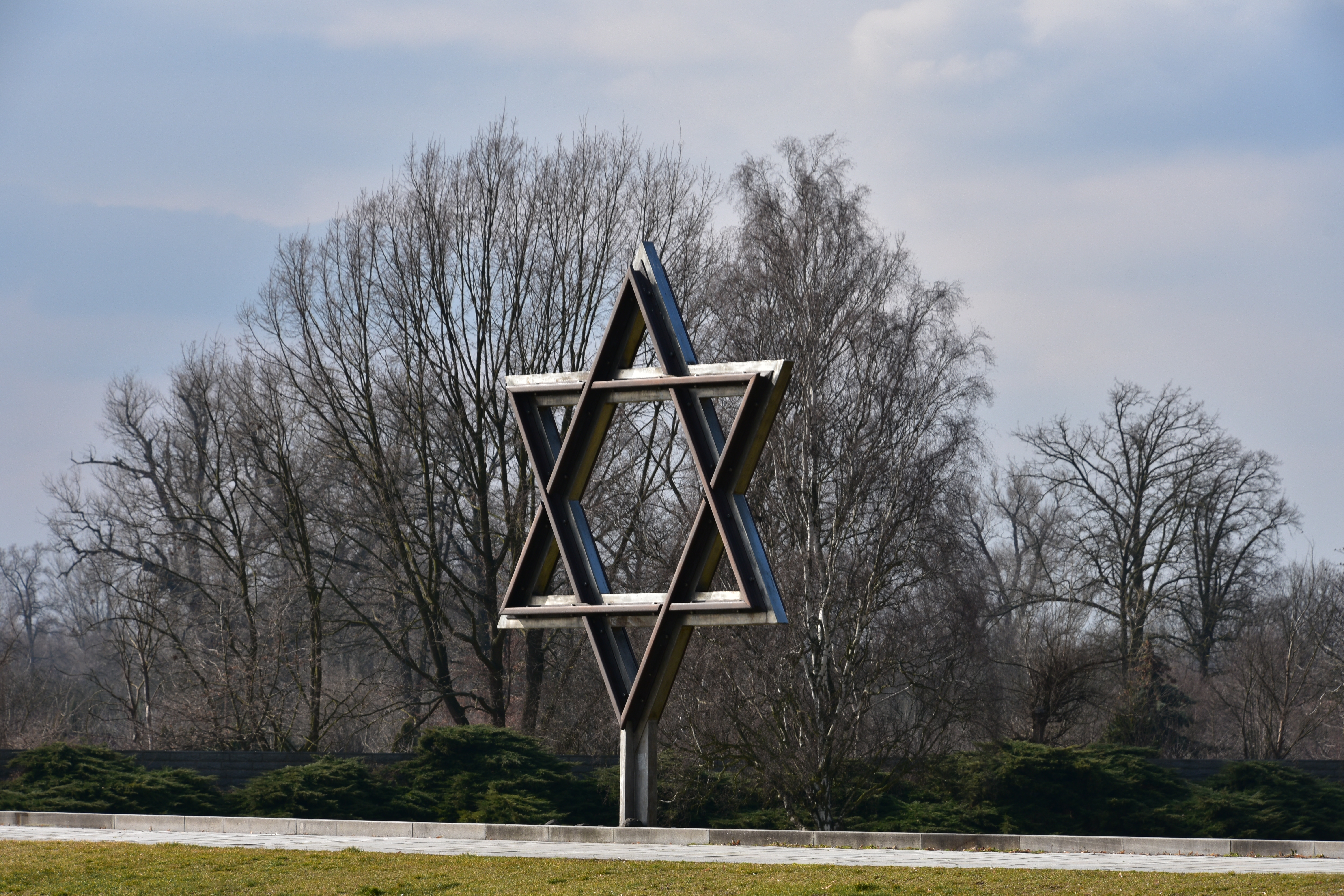 Terezin Nazi Concentration Camp (7)